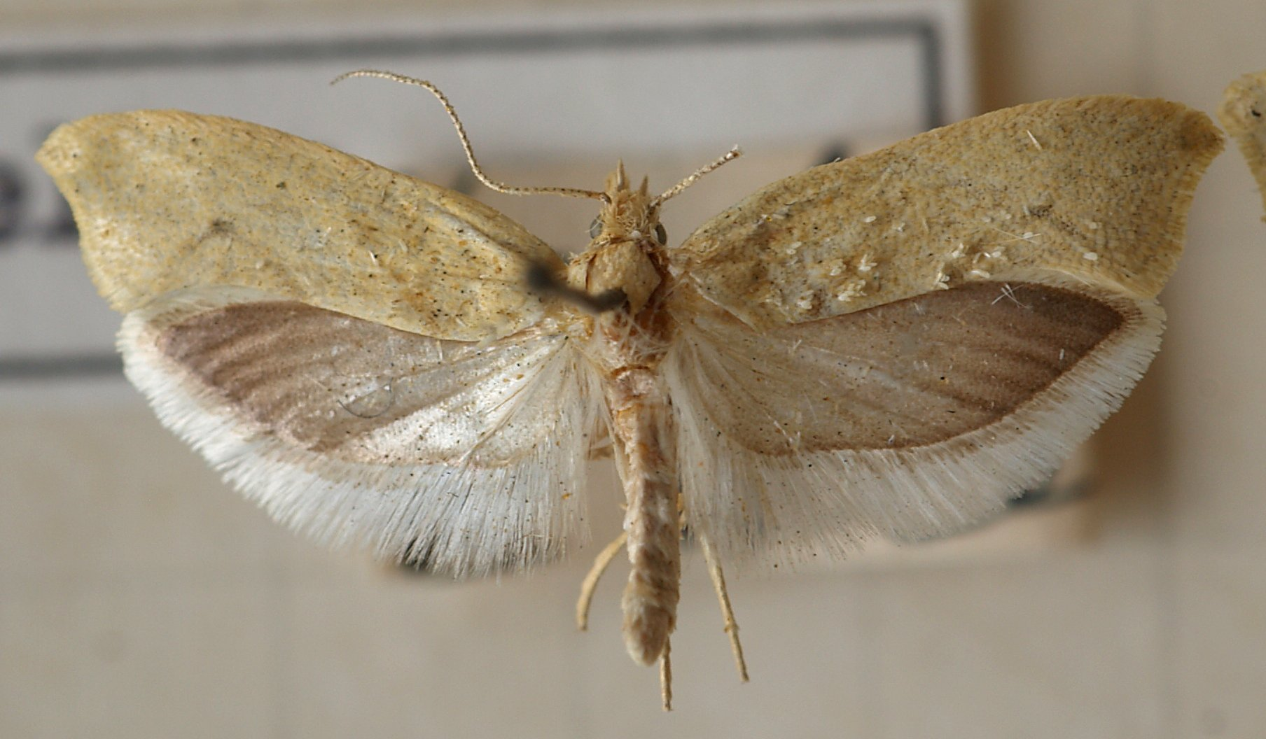 Ypsolopha persicella